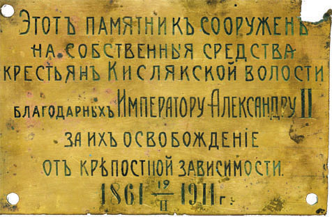 Пам'ятний знак до 50-річчя звільнення від кріпацтва